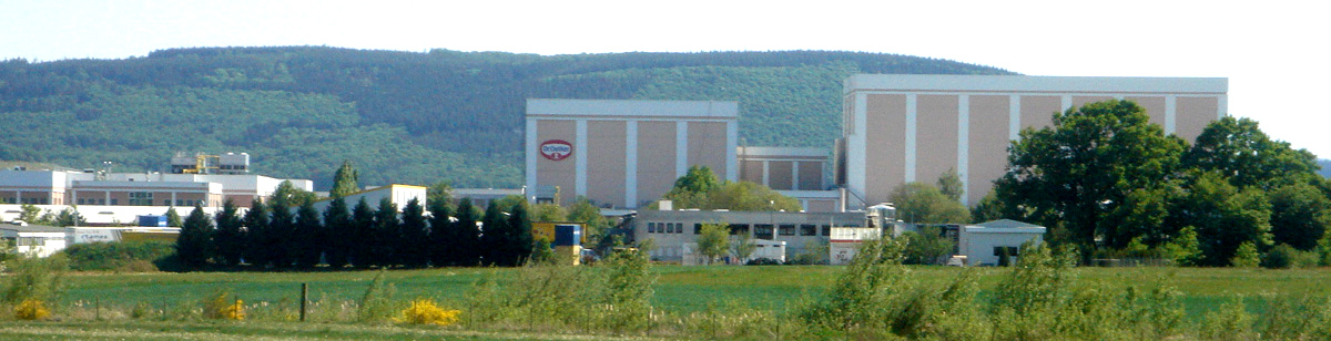 Dr. August Oetker Nahrungsmittel KG-Werk, Wittlich